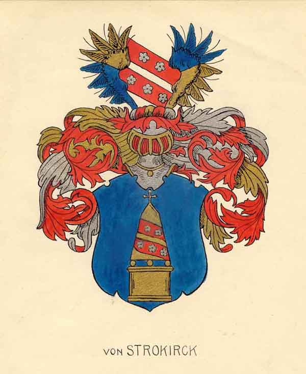 Adelsätten von Strokirchs vapen